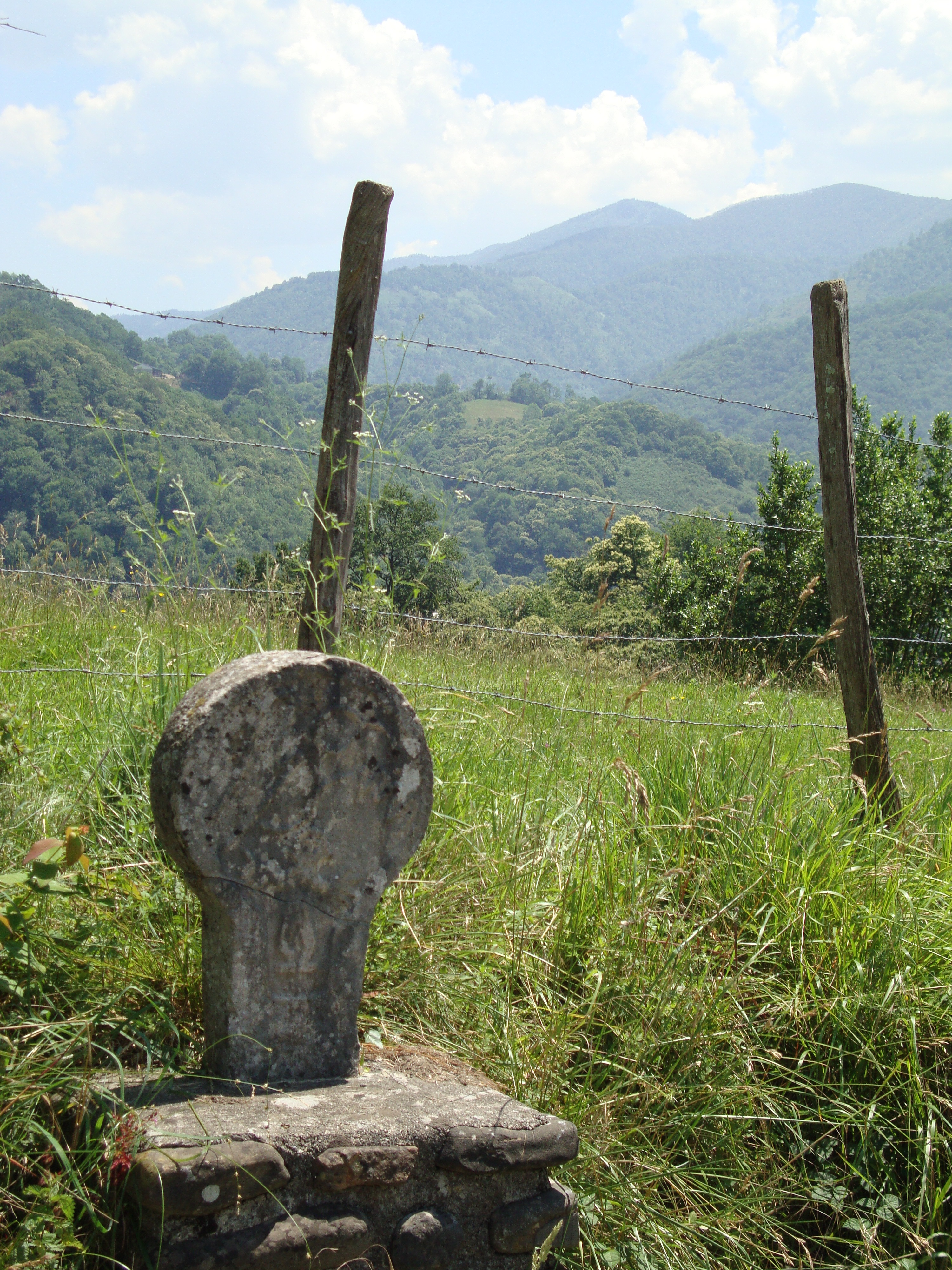 Etchebar (Pyr-Atl, Fr) paysage avec stèle basque à coté de la route.